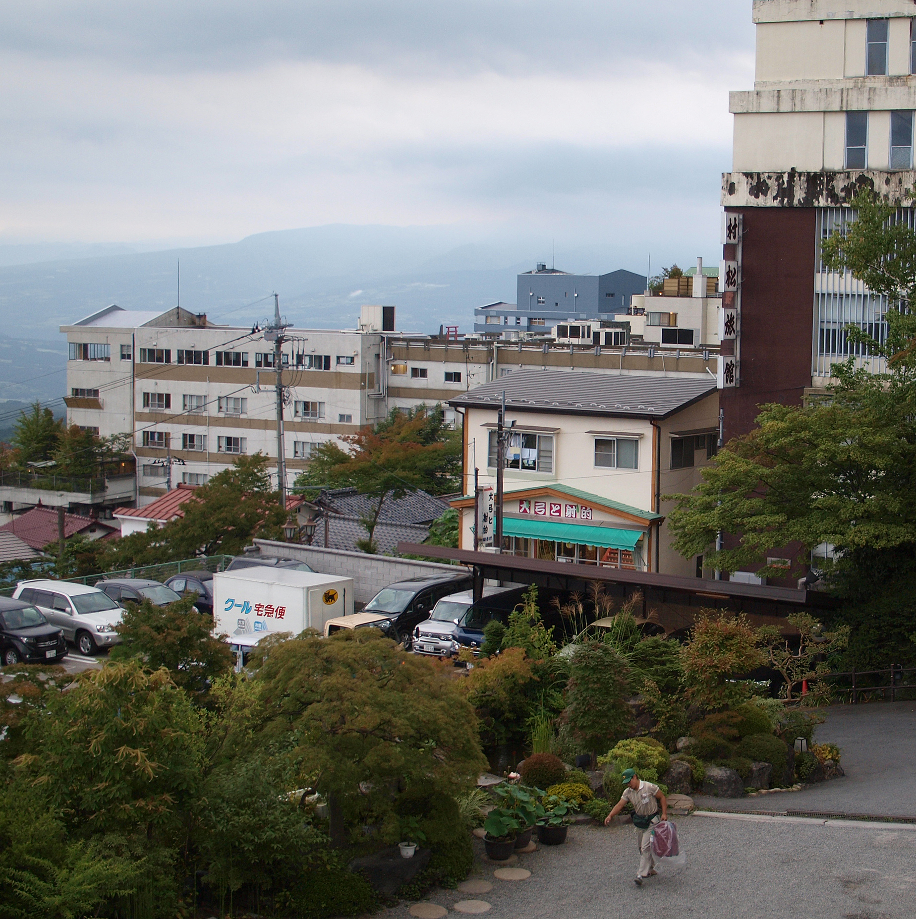 伊香保温泉・千明仁泉亭からの眺望。